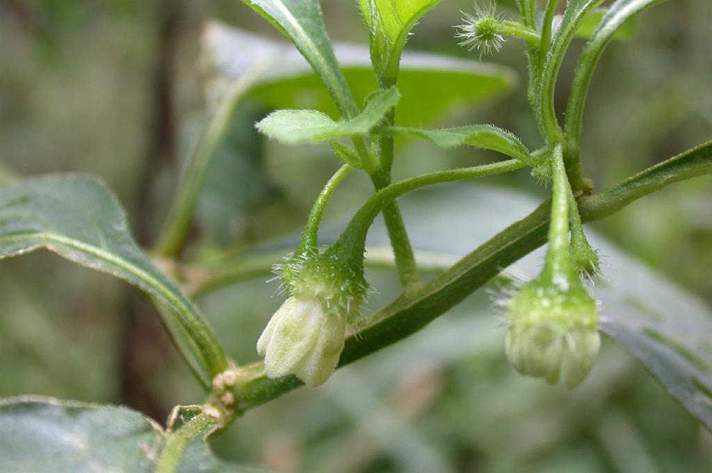 Physaliastrum echinatum：イガホオズキ 2002/09/15 和歌山県田辺市：Tanabe City. Wakayama Pref. Japan